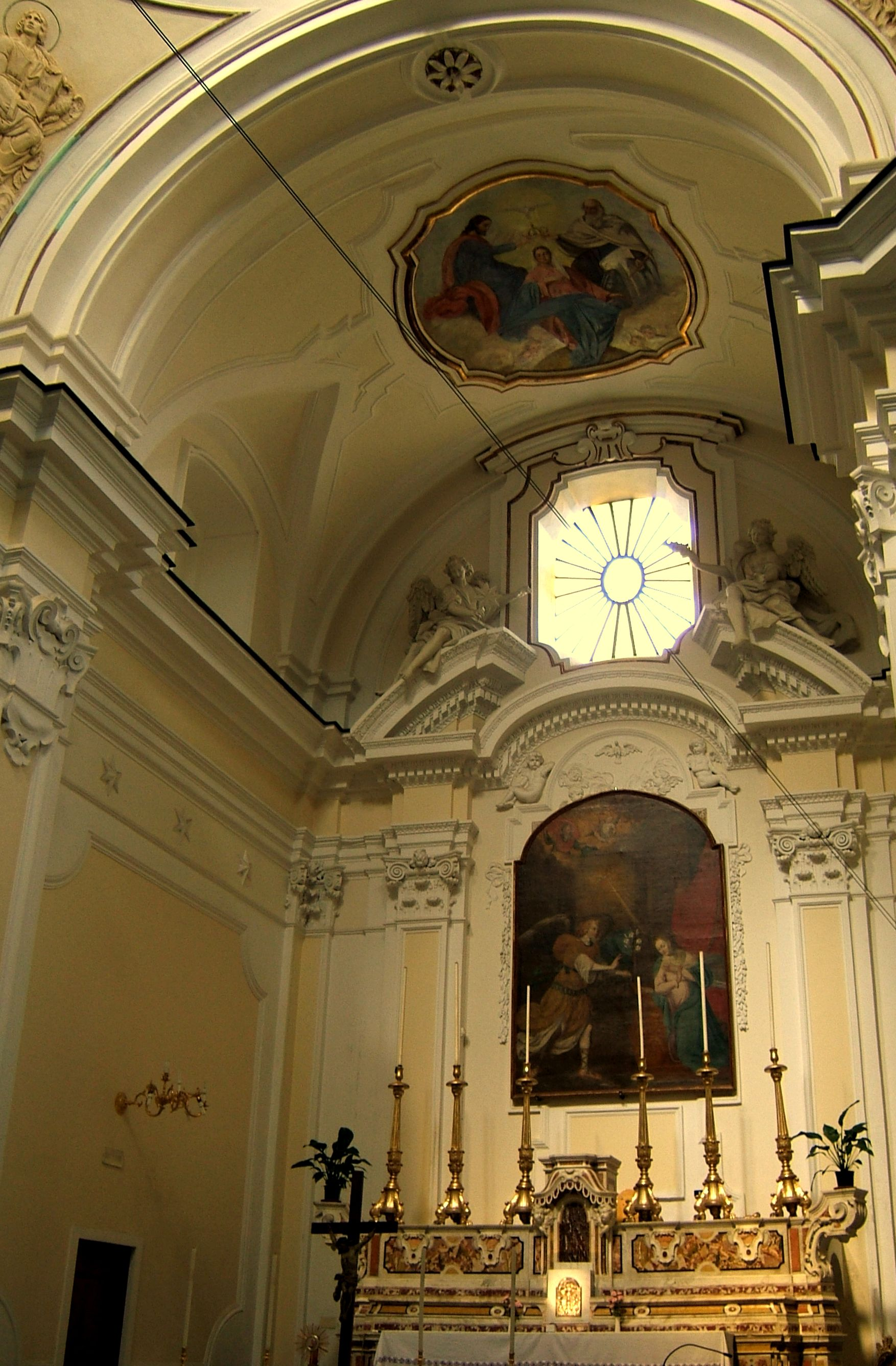 Il presbiterio della chiesa dell'Ave Gratia Plena.